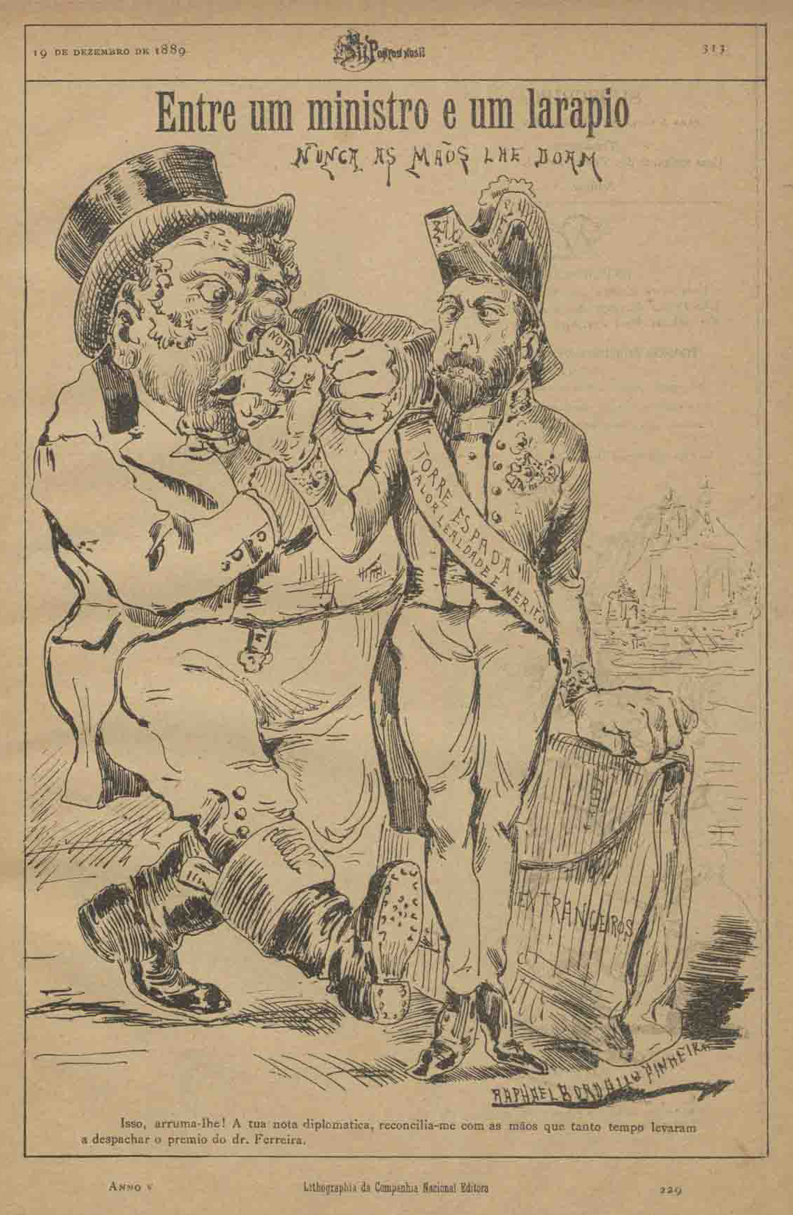 "Entre um ministro e um larapio" - Caricatura da autoria de Rafael Bordalo Pinheiro de John Bull (personagem Inglesa personificada) e o Ministro dos Negocios Estrageiros Henrique de Barros Gomes.